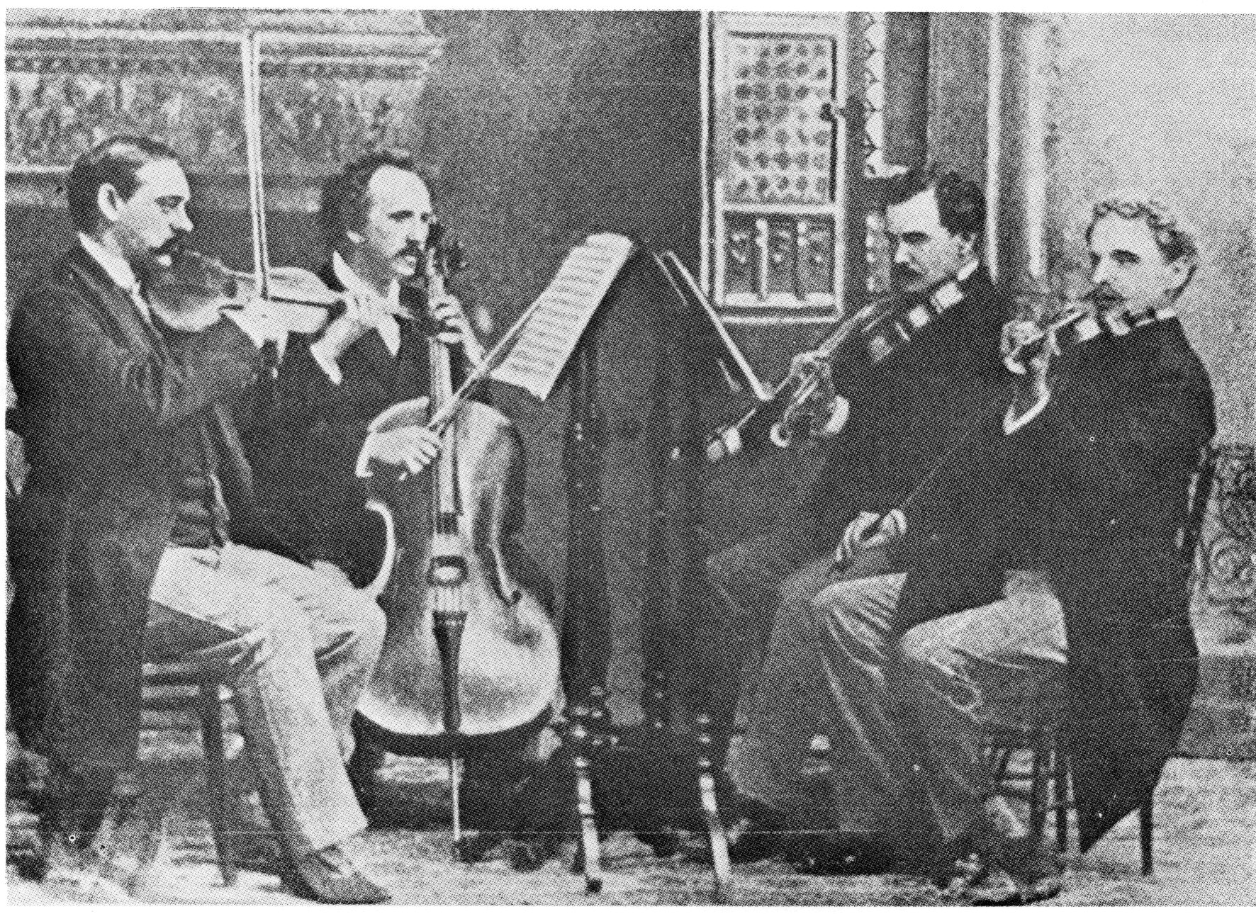 Kneisel String Quartet: Franz Kneisel (1st violin), Alwin Schroeder (cello), Otto Roth (2nd violin), Louis Svećenski (viola)